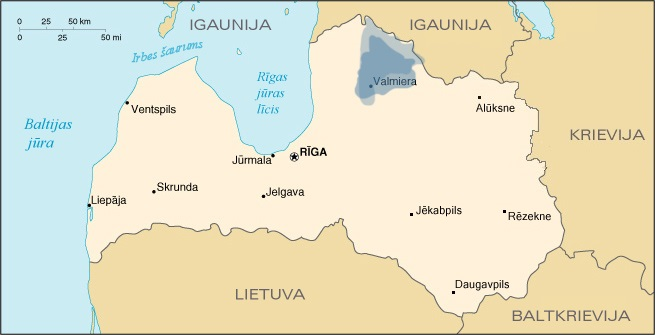 Imeras valsts (novada) teritorijas variācijas pēc dažādām vēstures kartēm.